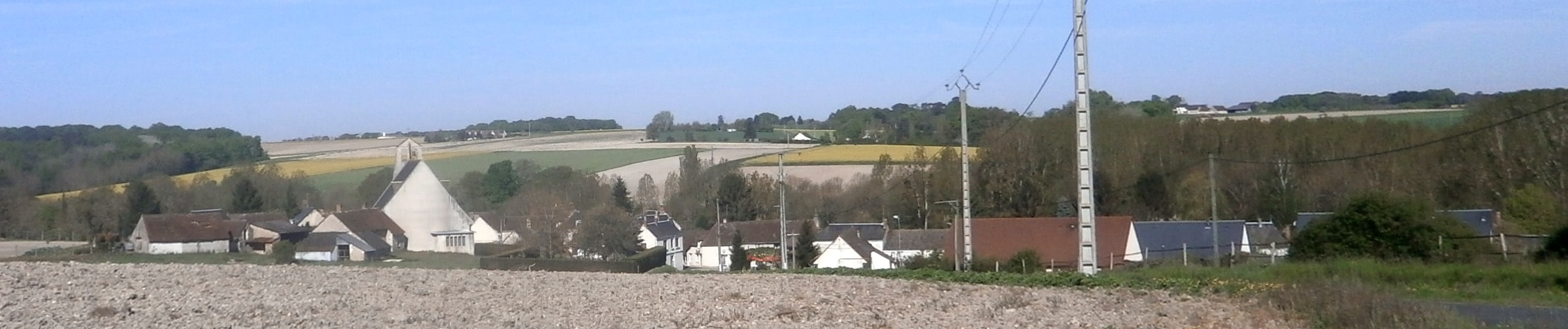 Panorama général de Beaumont-Village, vu de l'et vers l'ouest.